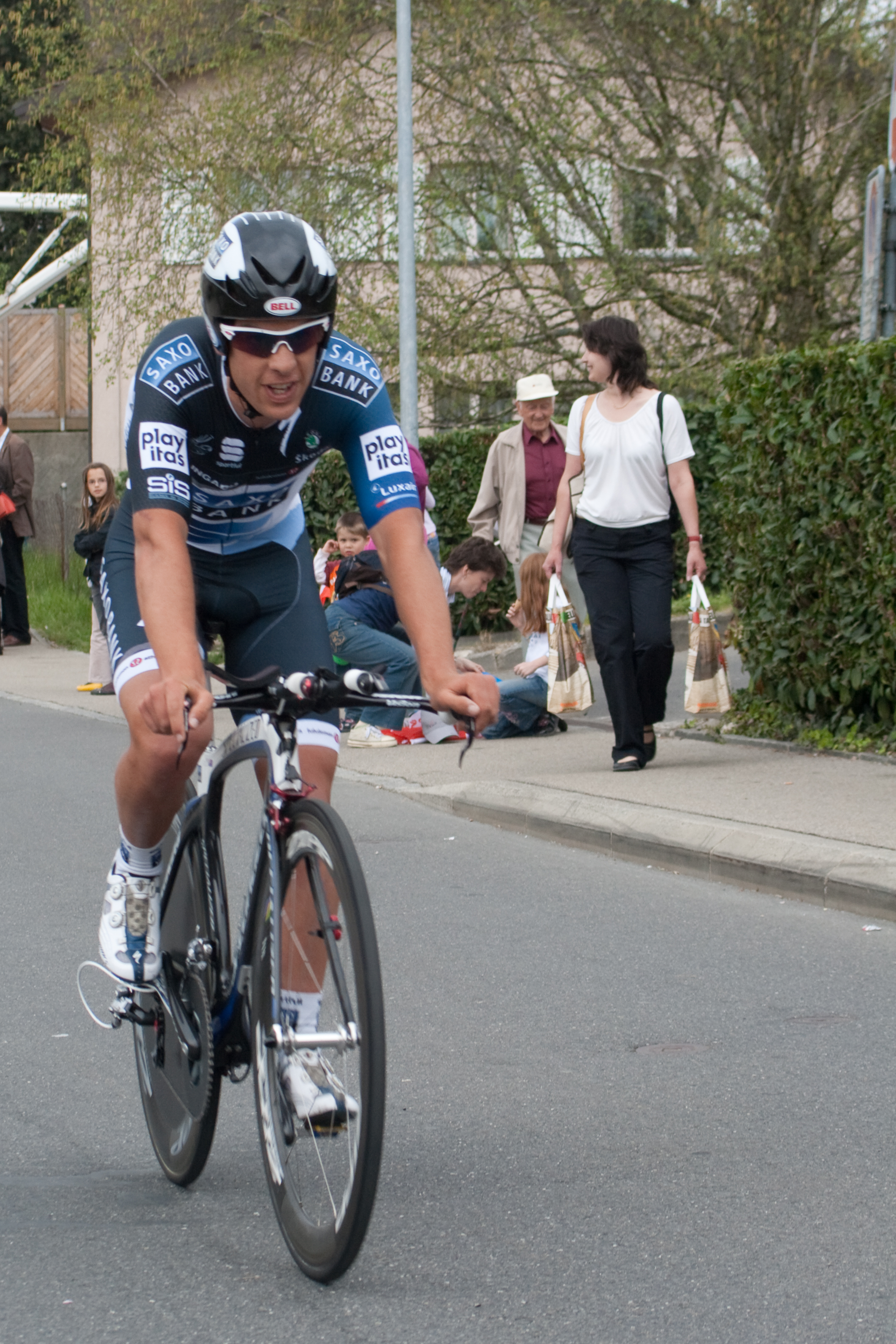 Richie Porte lors de la troisième étape du Tour de Romandie 2010